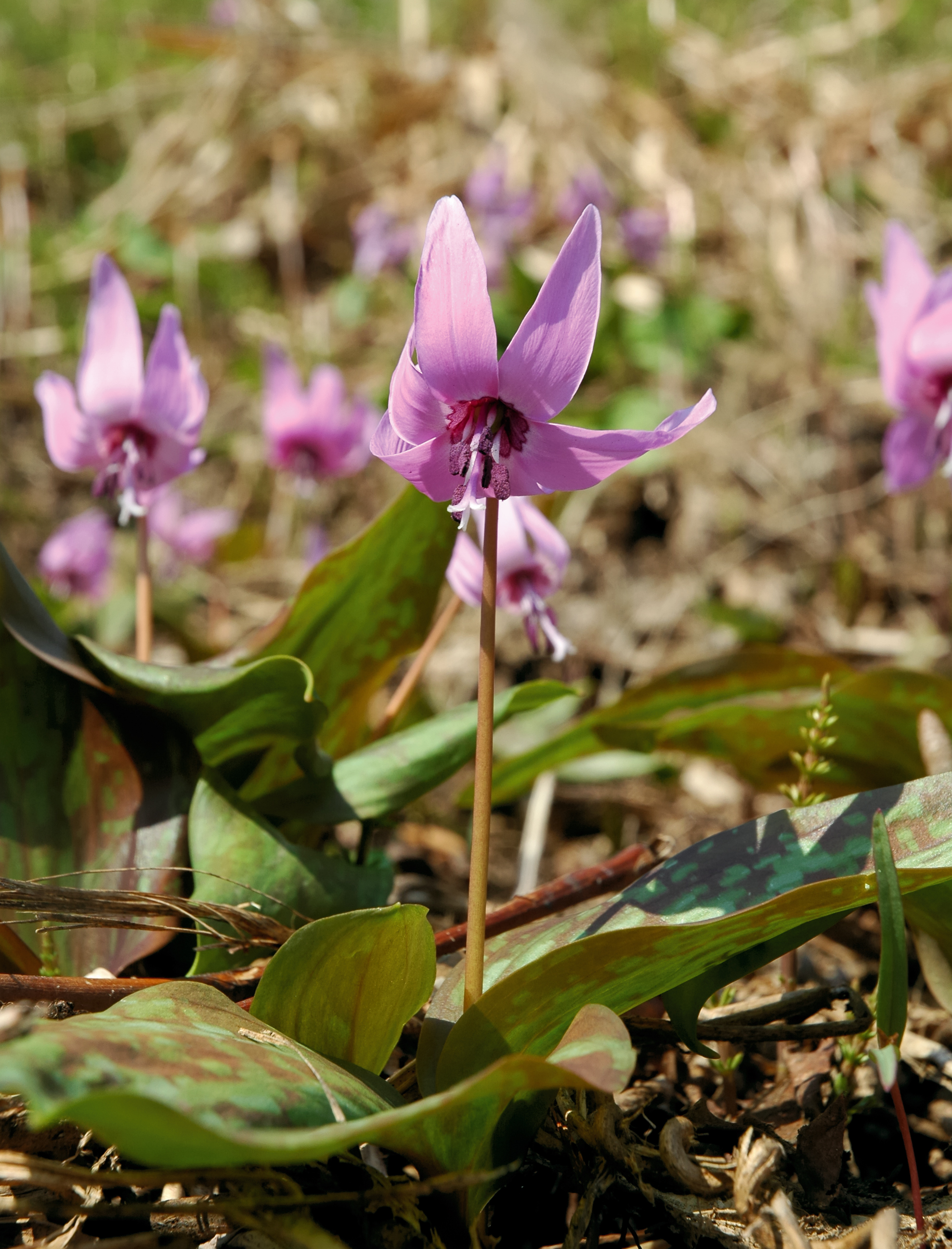 Erythronium japonicum (Katakuri, カタクリ)